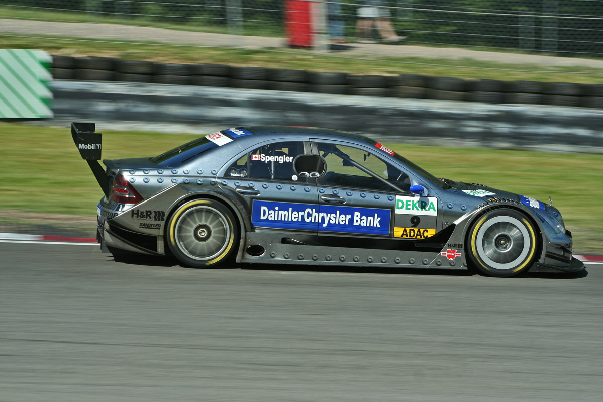 Bruno Spengler driving for Mercedes-Benz in the 2006 Deutsche Tourenwagen Masters season.